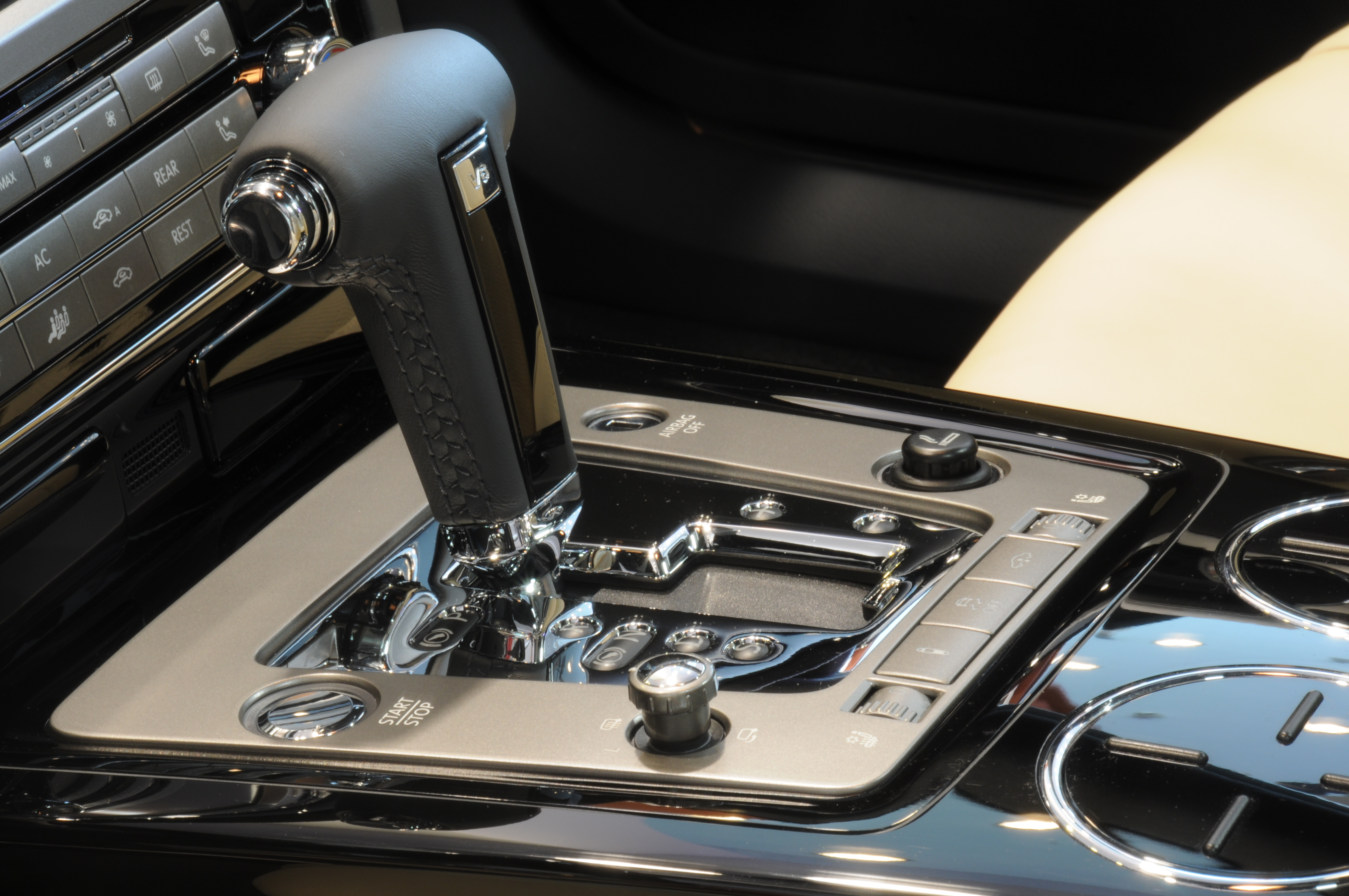 Detail Volkswagen Phaeton: Schalthebel